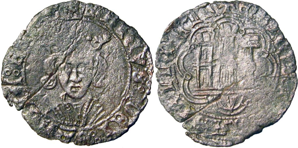 Tipo de moneda: CUARTILLO DE ENRIQUE IV Ceca: VILLALÓN DE CAMPOS año: 1454-1474 Peso:3 gr. Medida: 27 mm anverso: ENRICVS · CARTVS · DEI · G alrededor de un circulo que contiene un busto coronado de frente. reverso: ENRICVS · DEI · GRACIA · REX alrededor de un circulo que contiene un castillo con ceca, Villalón "V" bajo el castillo. Variantes: "V" bajo el castillo y Cruz al lado derecho del castillo.